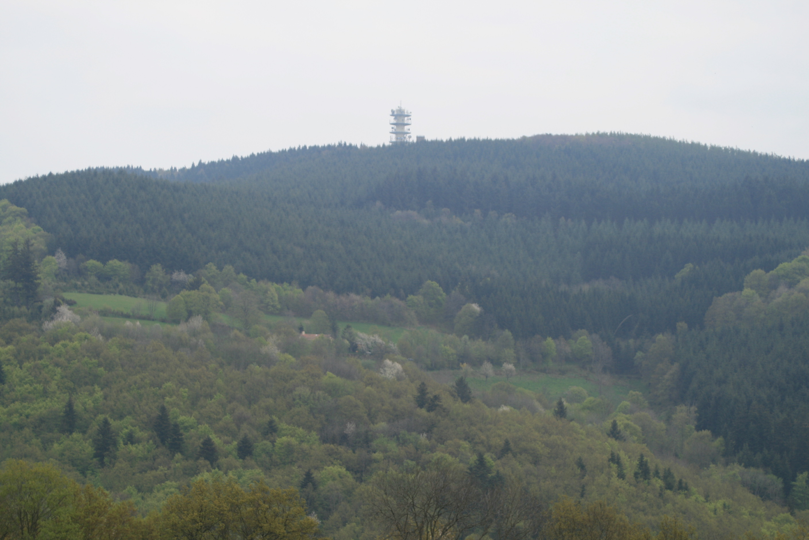 Vue du Mont Boussuivre depuis la D1 reliant Violay à Tarare